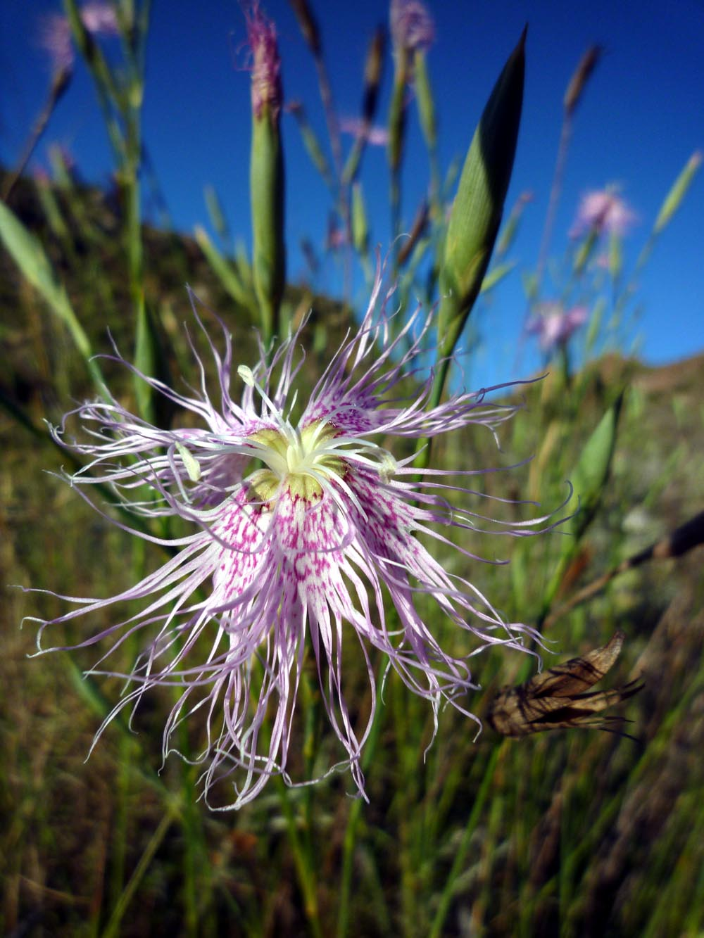 Dianthus broteri en el Parque Natural de la Sierra de la Muela (Cartagena, España).